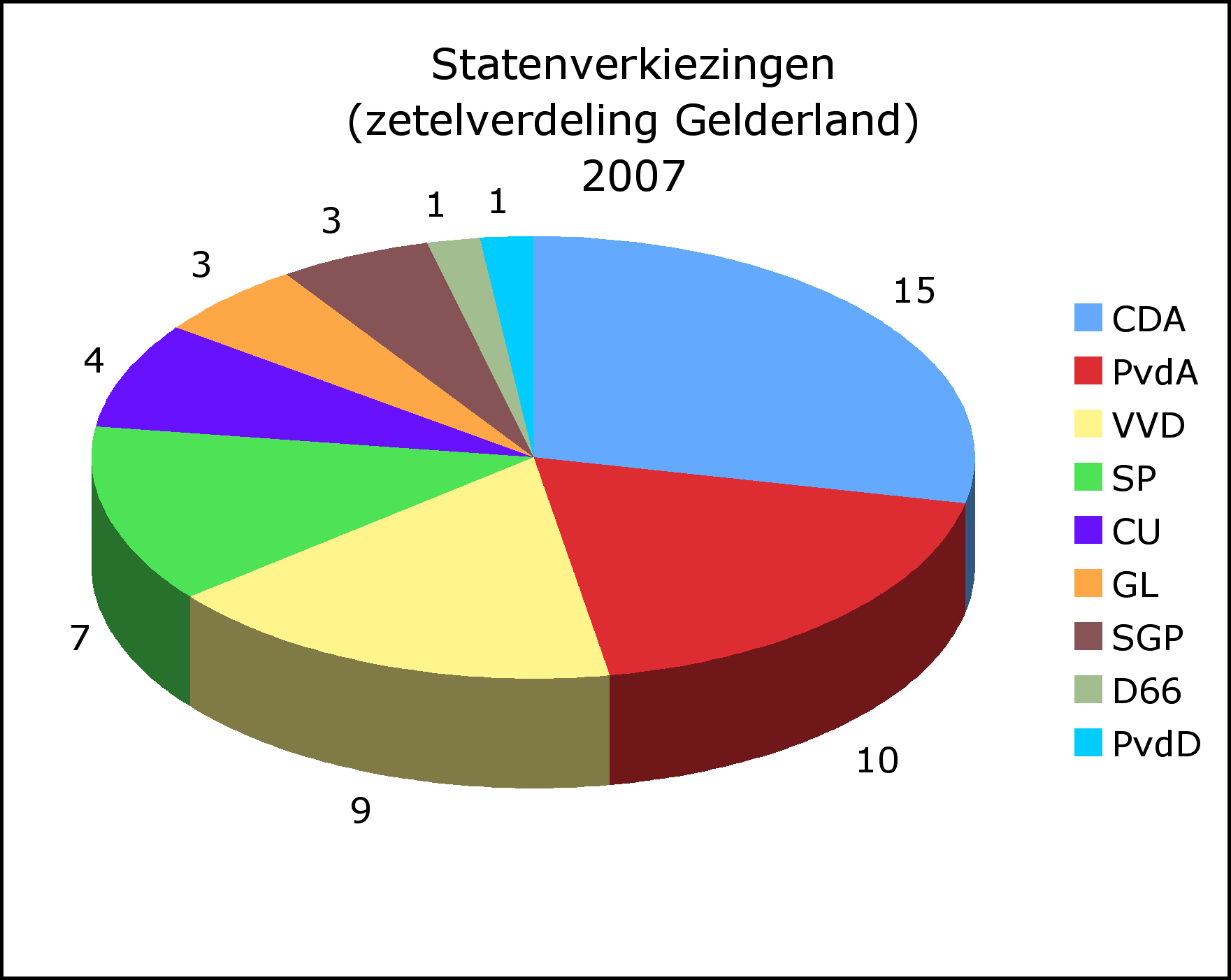 Uitslag provinciale statenverkiezingen Gelderland vertaald in zetels